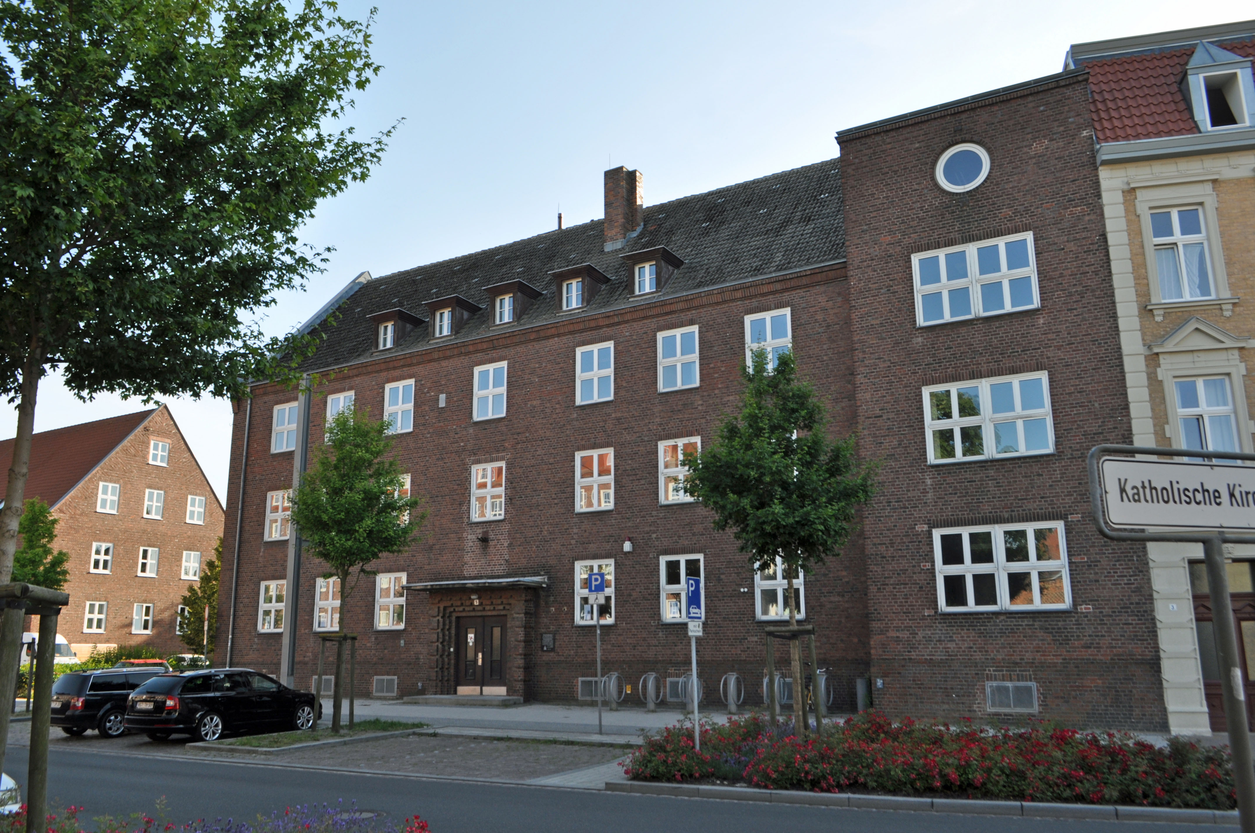 Stralsund, Frankendamm 5. Ehemaliges Verwaltungsgebäude, errichtet Anfang der 1930er Jahre. Genutzt als Marinebauamt, später Sitz des MfS. This is a photograph of an architectural monument.